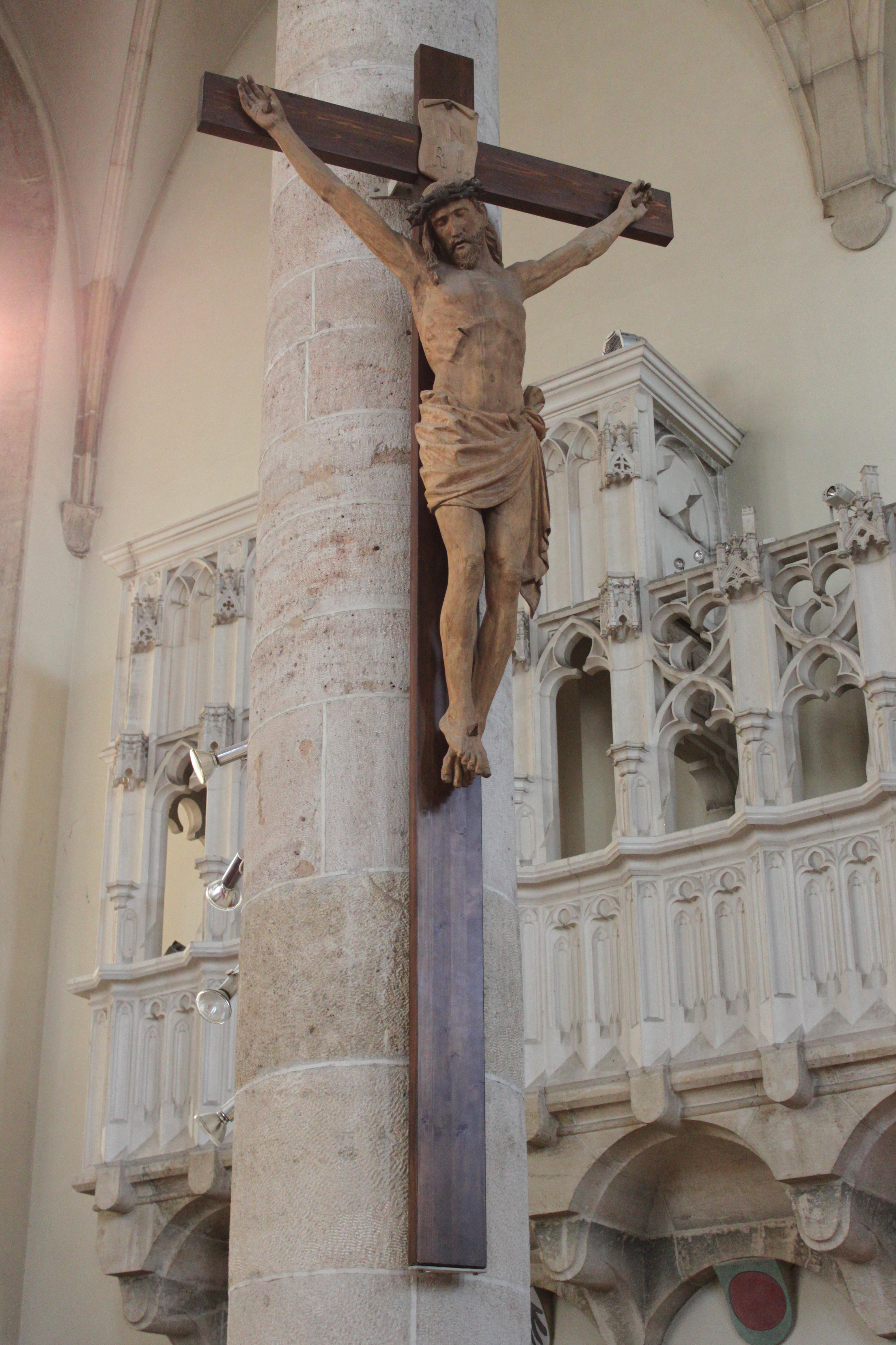 Georgskapelle, Großer Kruzifix, Pfeiler vorne rechts